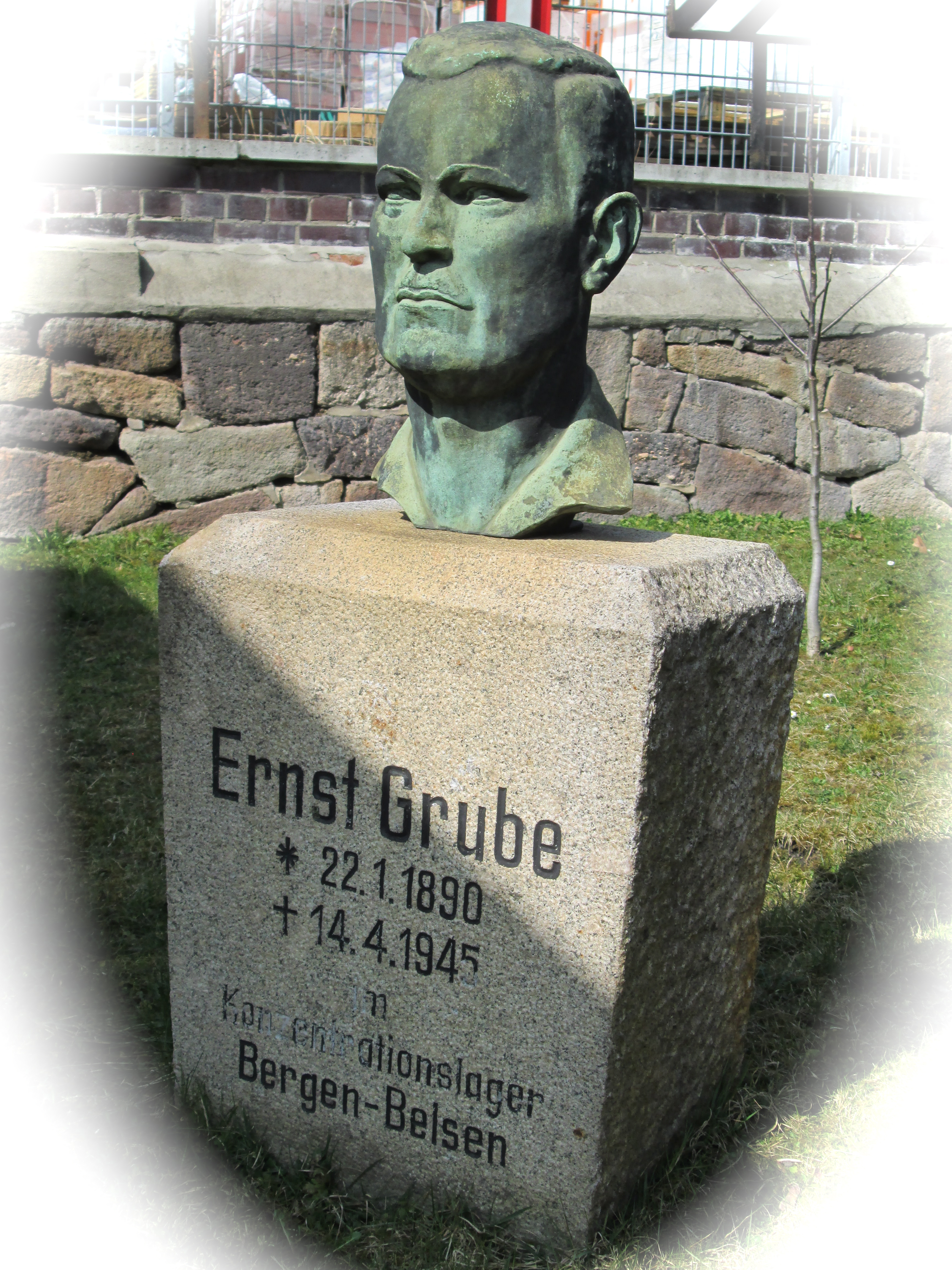 Büste Ernst Grubes; aufgenommen im Werdauer Heimatmuseum